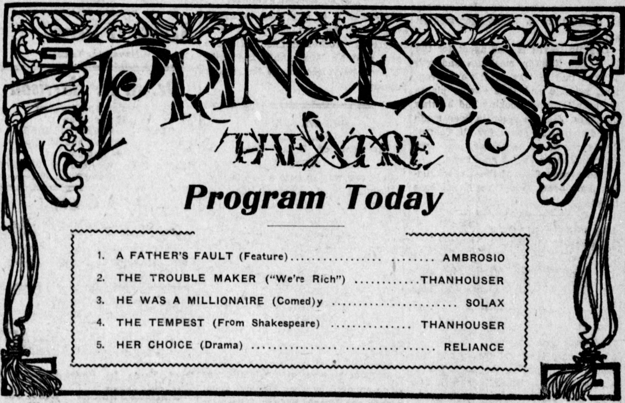 A newspaper advertisement for several 1912 films